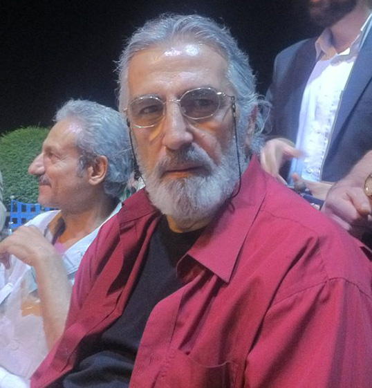 فریدون شهبازیان (مراسم جشن سینمای ایران و بازگشایی خانه سینما ۲۲ شهریور ۱۳۹۲ تالار دیپلماتیک آبگینه تهران)